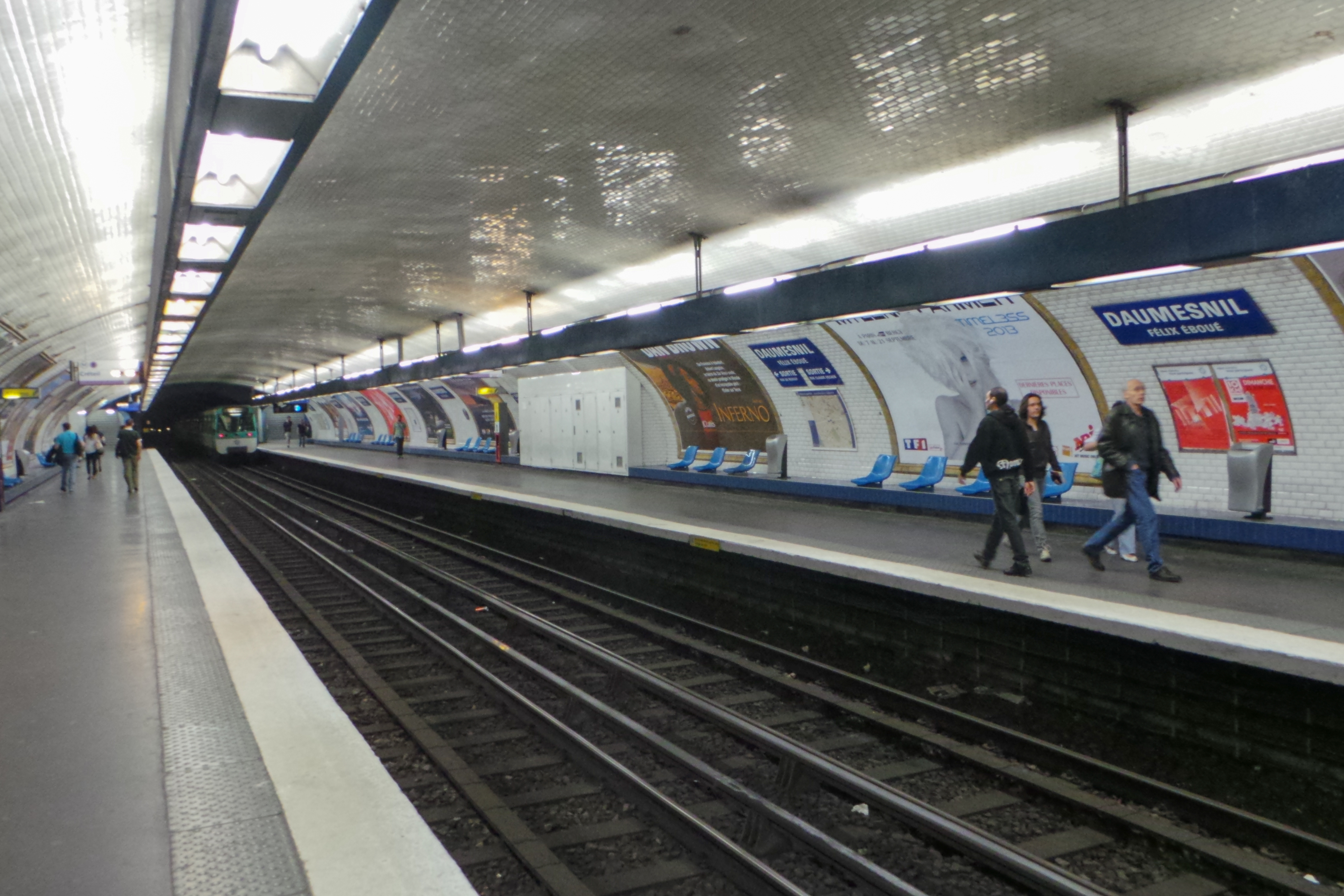 Station de métro Daumesnil, ligne 8 du métro de Paris - Paris, France